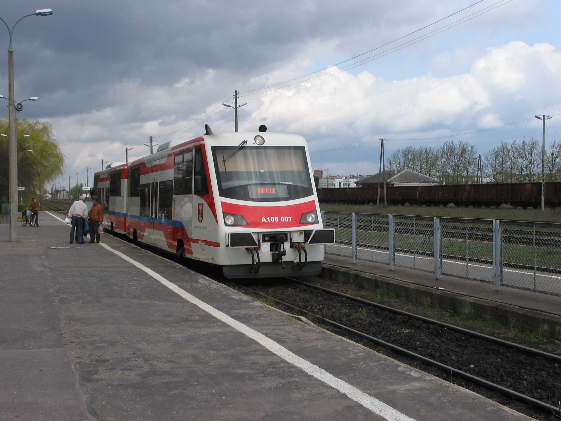 SA108-007 jako pociąg osobowy nr 88430 do Siedlec (odj. 11:50) na st. Hajnówka